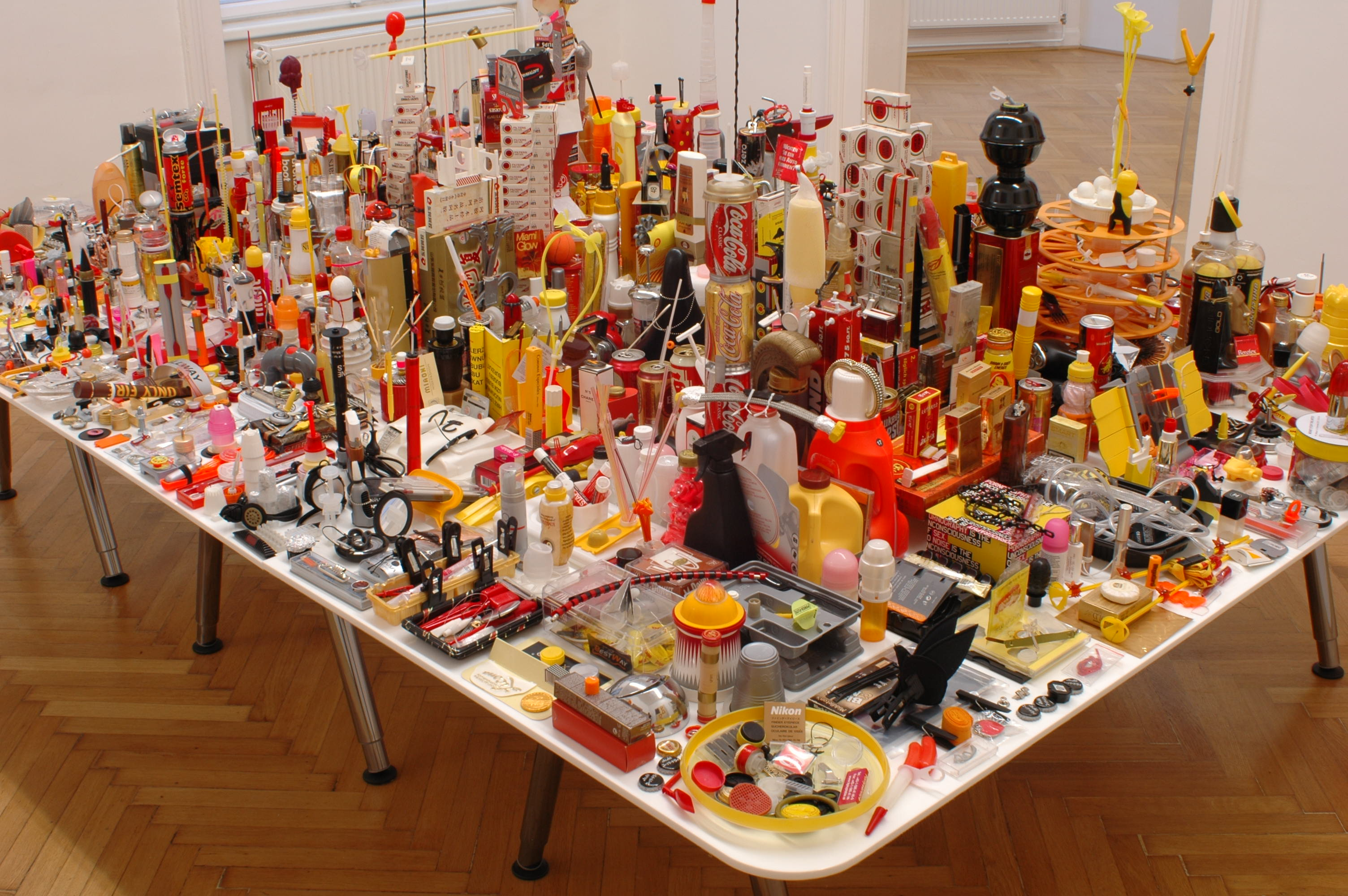 Georg Salner, Ausstellung extradimensionen, Galerie Strickner, Wien, 2009 Ausstellungsdetail: E/O/S Tableau (Acrylglas, Stahl) mit diversen industrial designten Objekten, 200 x 300 cm (Gesamtgröße 2019: 200 x 800 cm)